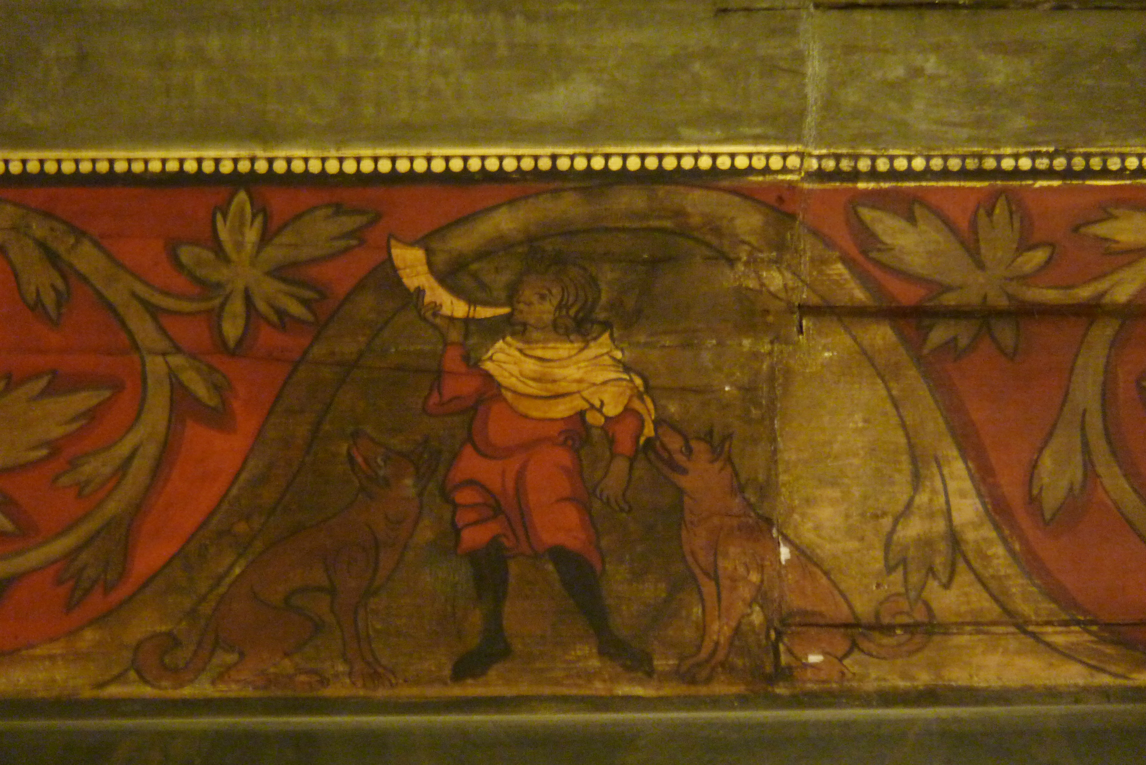 Rathaushalle des Rathauses in Mühlhausen/Thüringen, gotische Spitzbogentonne mit Ornamentfriesen mit Medaillons, nördlicher Fries mit Jagdszenen, teilweise aus gotischer Zeit erhalten